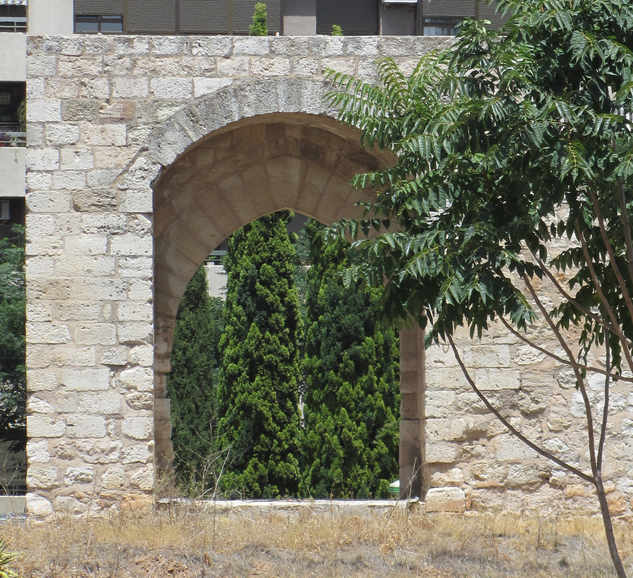 Puerta del Torreón del Alcázar, situado en el Paseo de Pablo Picasso, en Ciudad Real (España).